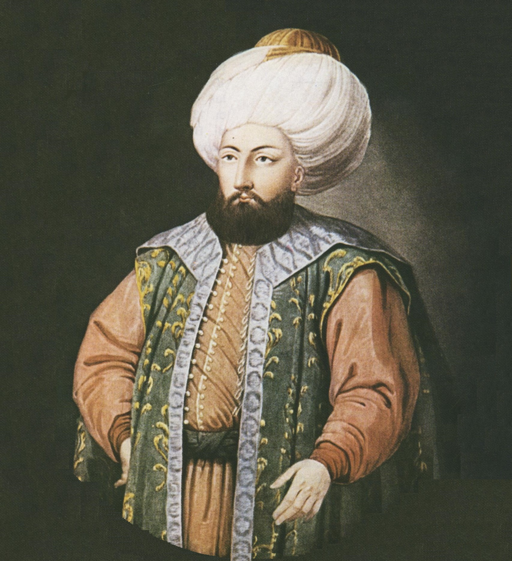 رسم لِلسُلطان الغازي مُحمَّد چلبي المعروف بِمُحمَّد الأوَّل.